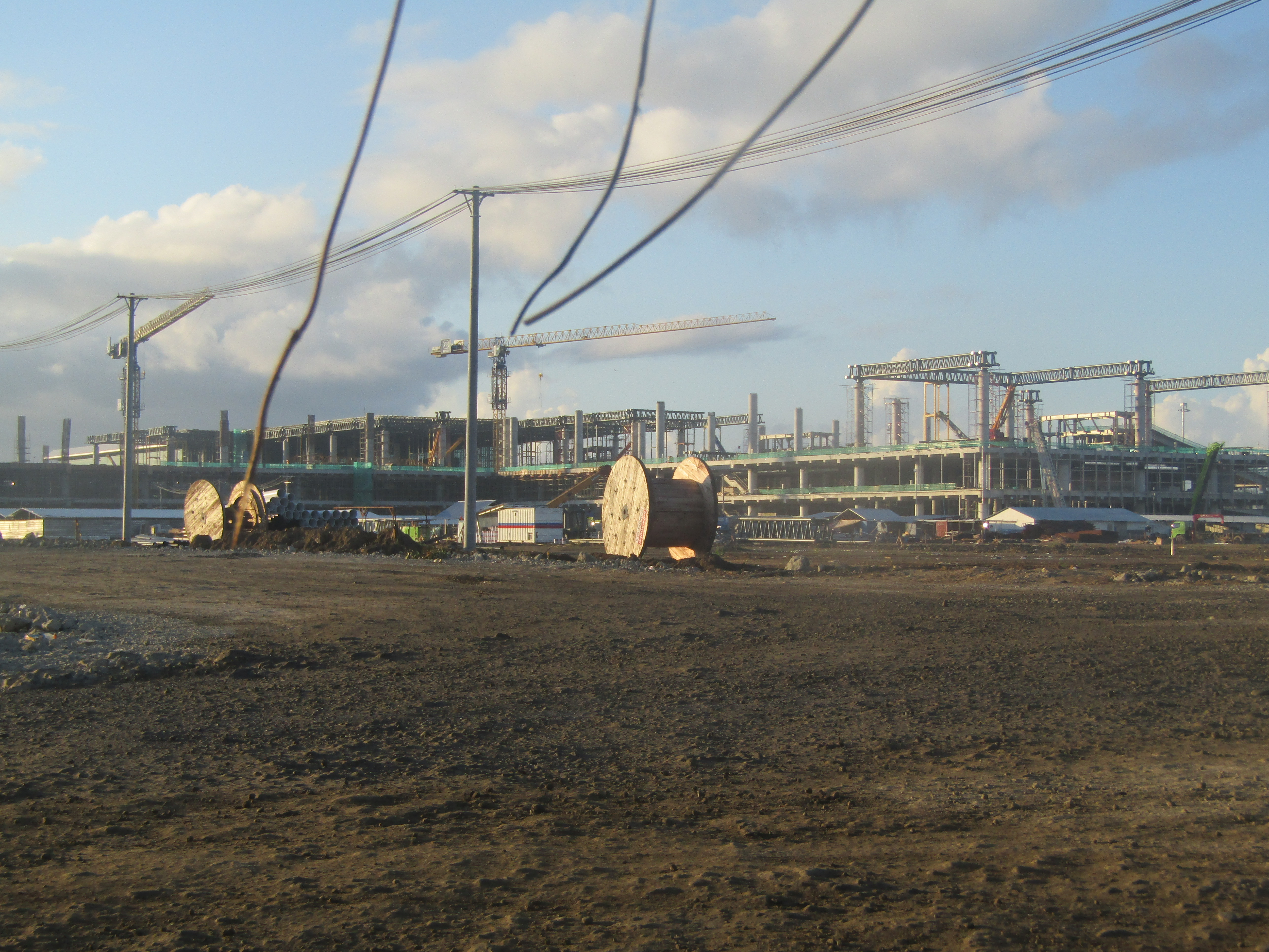 Progres pembangunan Bandara YIA